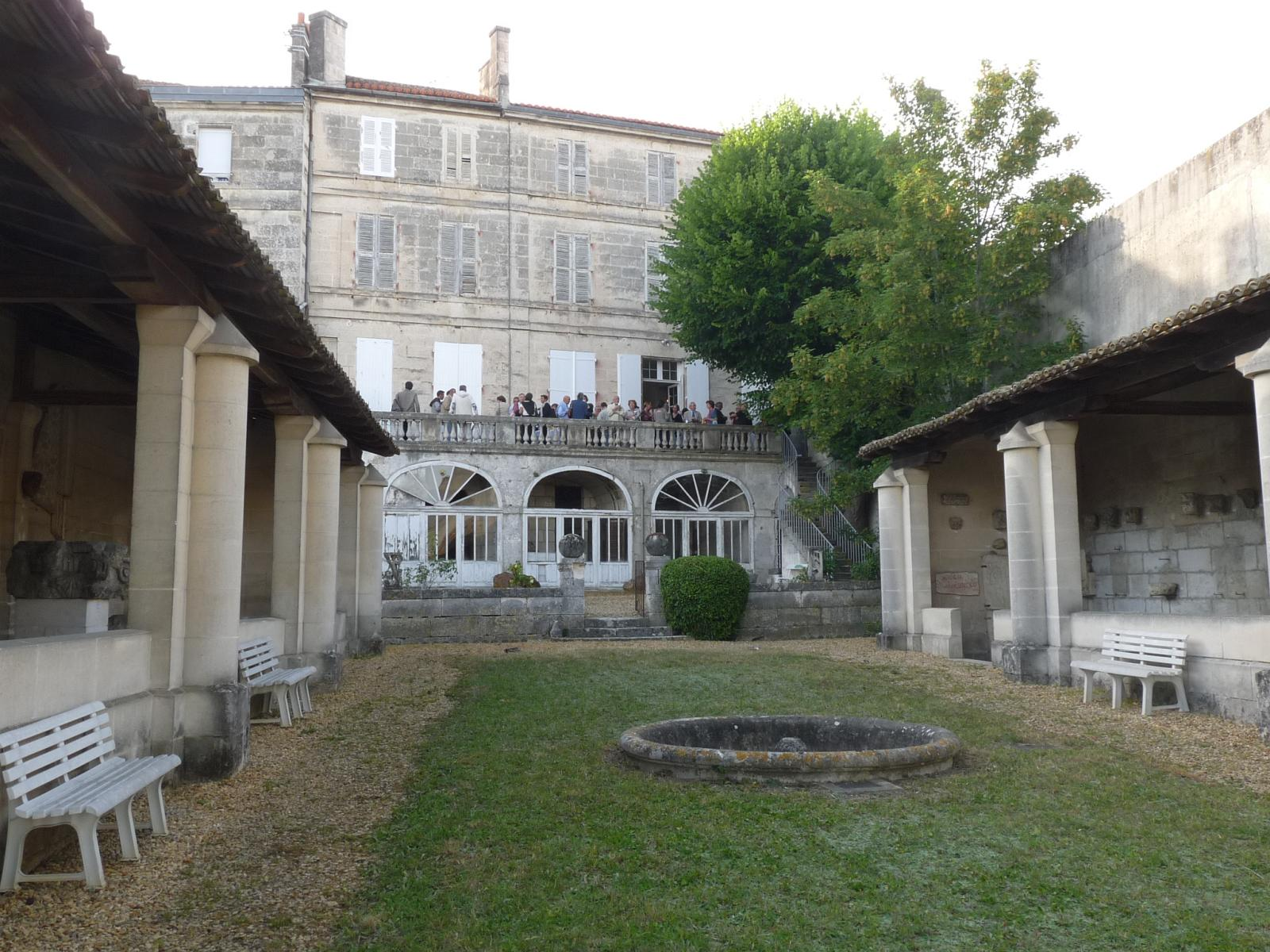 Jardin et galeries lapidaires du musée archéologique d'Angoulême, France